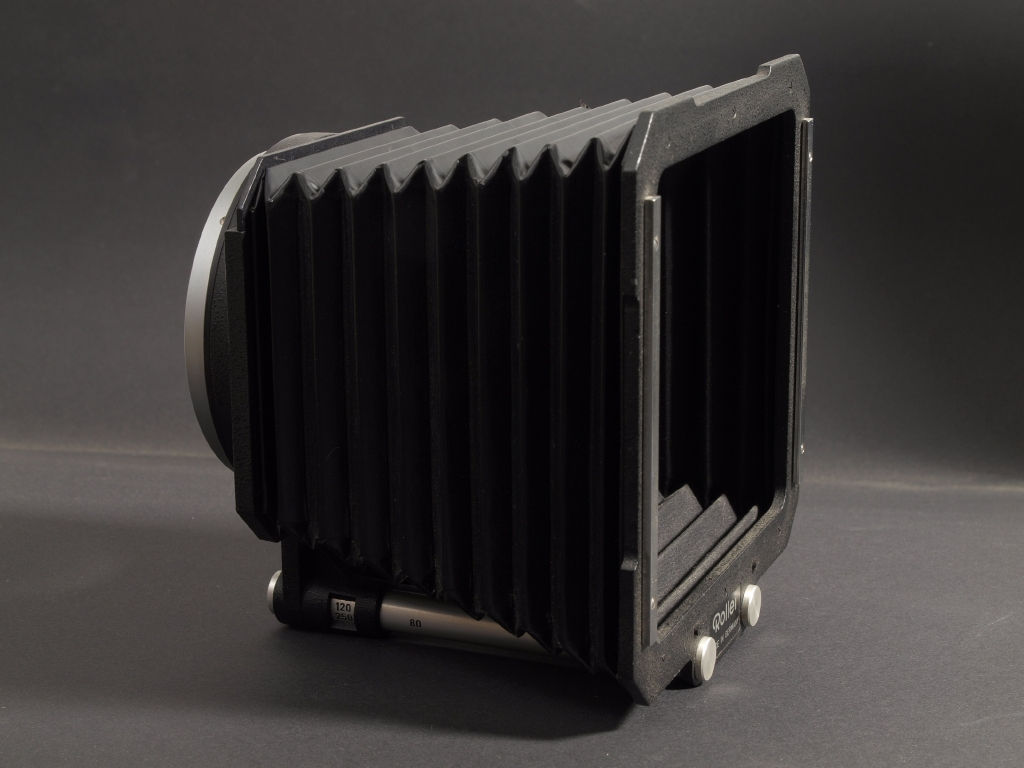 Kompendium (Streulichtblende) mit Rollei Bajonett Gr. VI. Mit Einschüben für Filterfolien oder Masken. Vorne 110 mm ☐, hinten 75 mm ☐